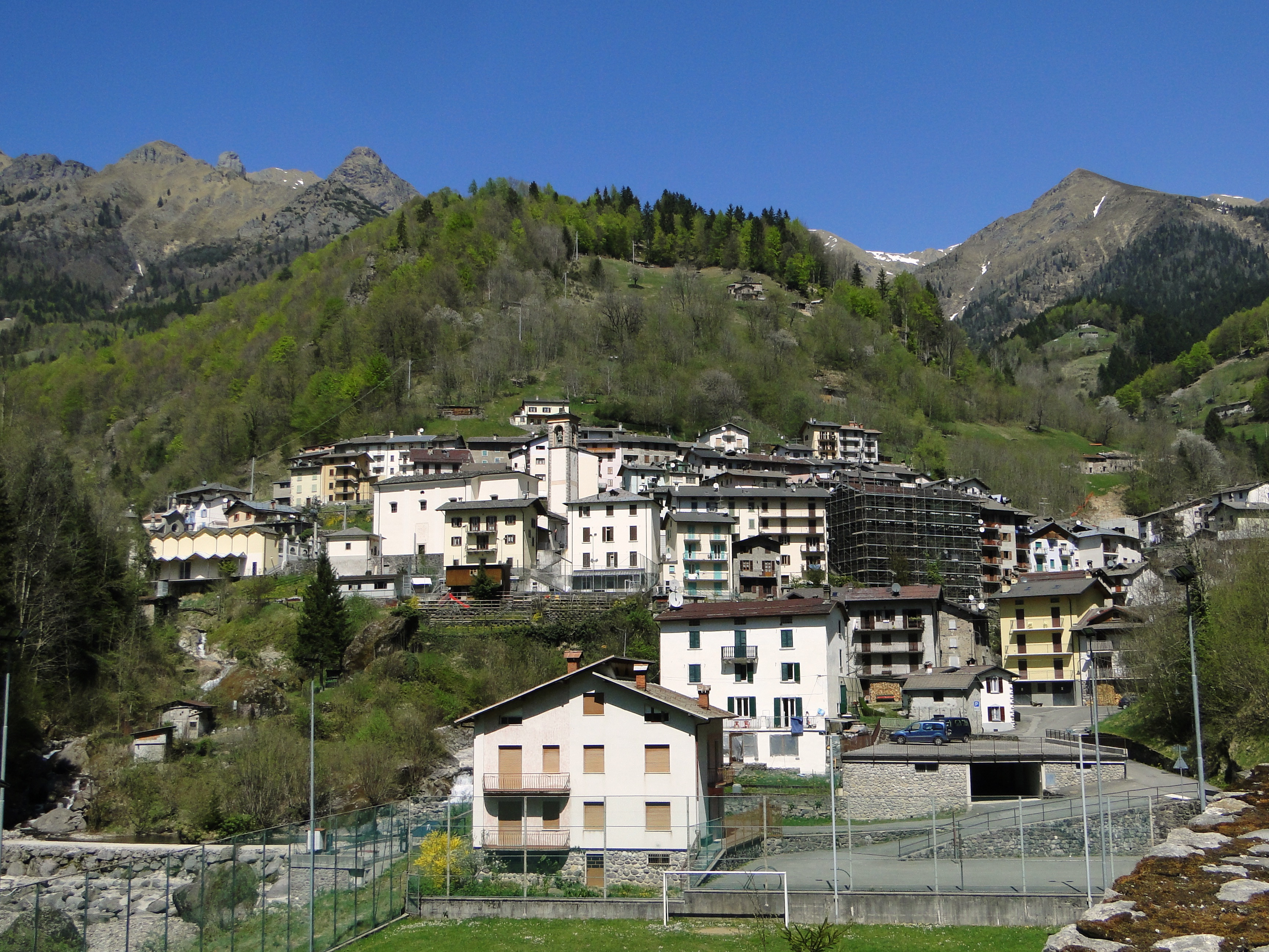 Vista di Ornica (BG)